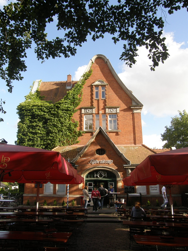 S-Bahnhof Rübenkamp.This is a photograph of an architectural monument.